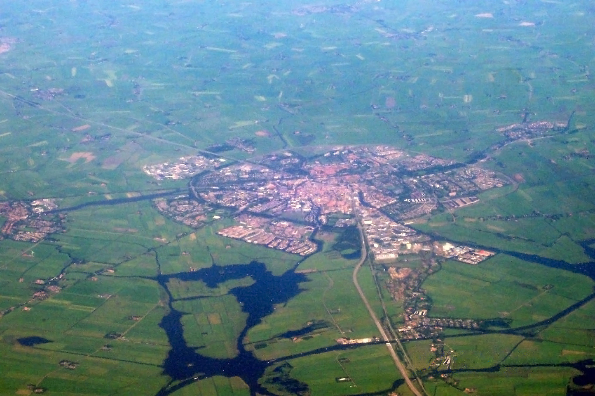 Luchtfoto van Sneek Sneek